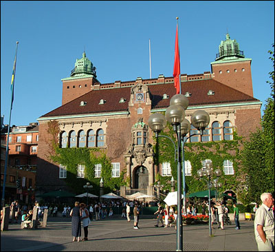 Bild på Rådhuset i Borås